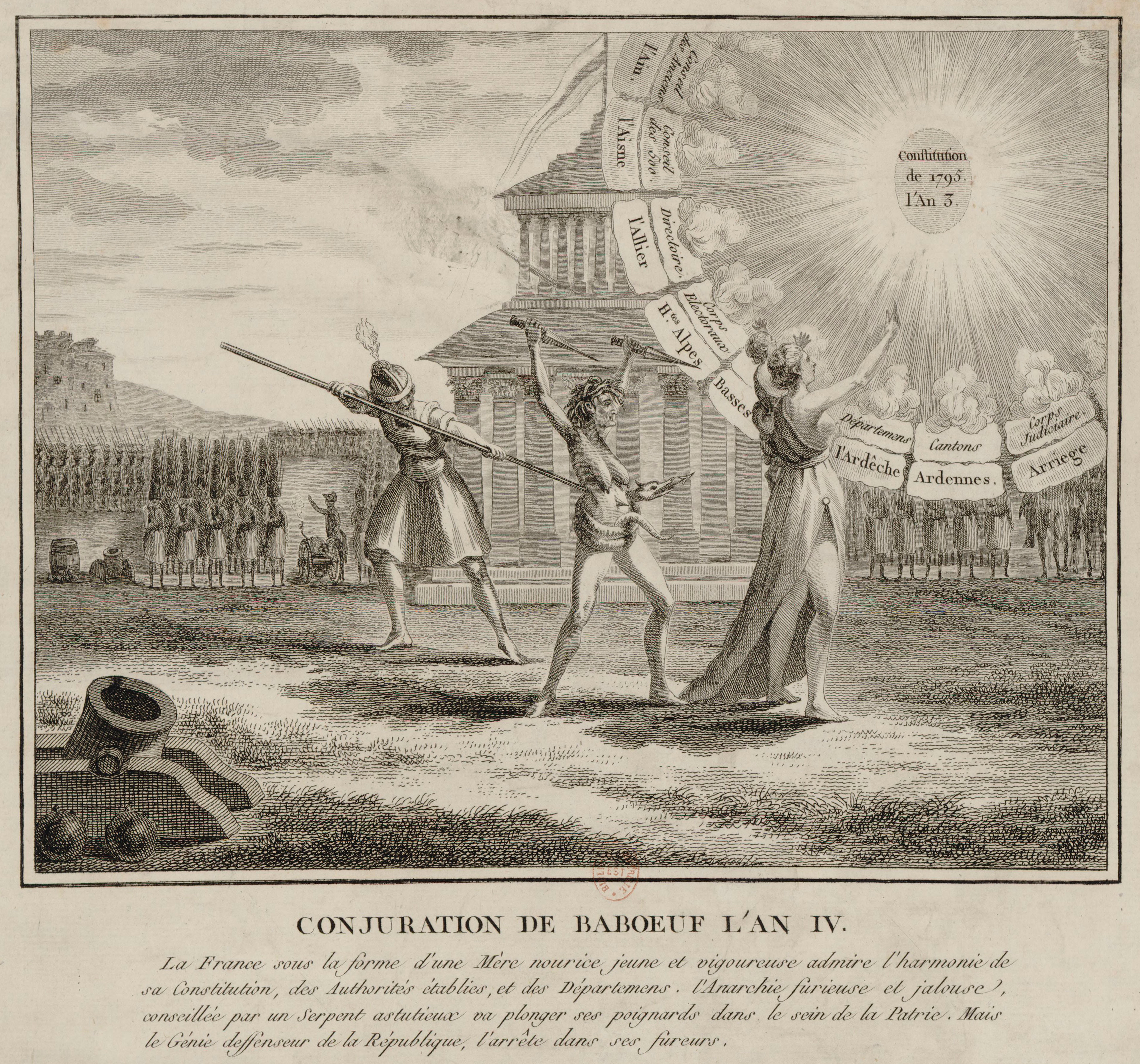 Conjuration de Baboeuf l'an IV : la France sous la forme d'une mère nourice jeune et vigoureuse admire l'harmonie de sa Constitution, des authorités établies et des départemens. L'anarchie furieuse et jalouse conseillée par un serpent astutieux va plonger ses poignards dans le sein de la patrie. Mais le génie deffenseur de la République l'arrête dans ses fureurs. Estampe anonyme stigmatisant la Conjuration des Égaux.